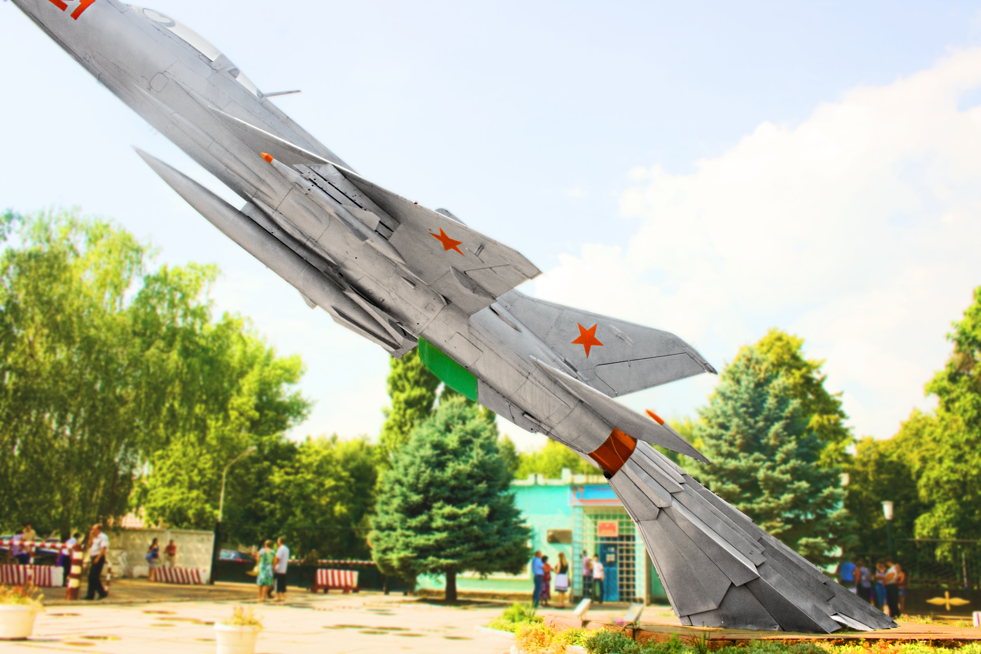 МИГ-21Ф-13. Армавир. 2011.